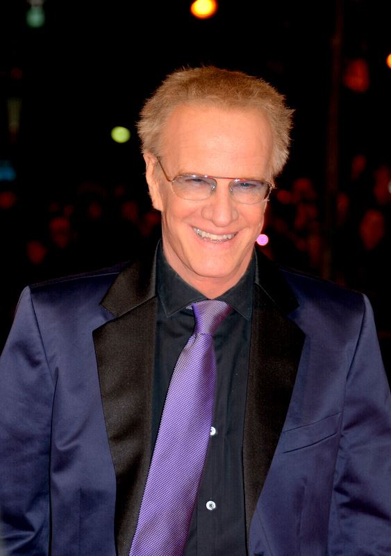 Christophe Lambert à la cérémonie des César